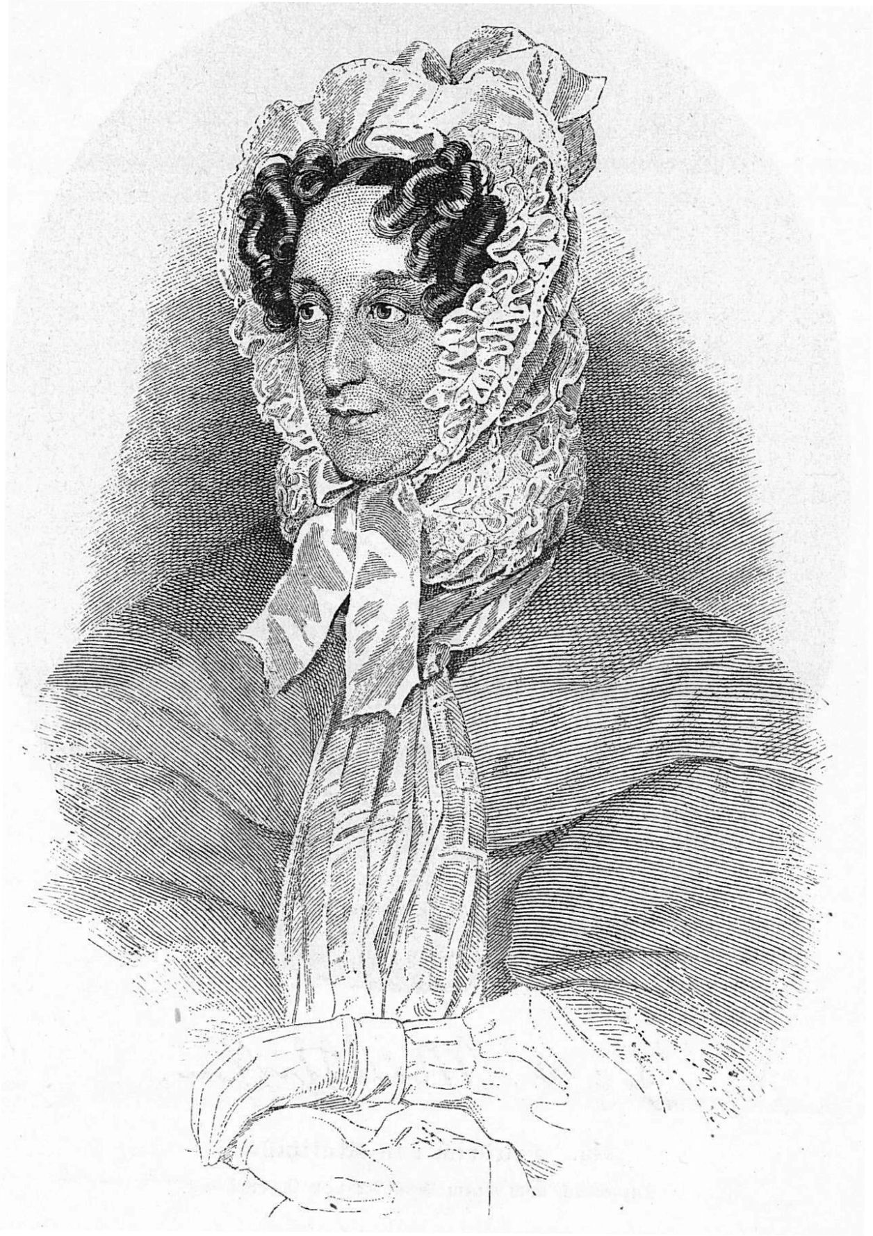 Stich der Schriftstellerin Karoline Pichler.